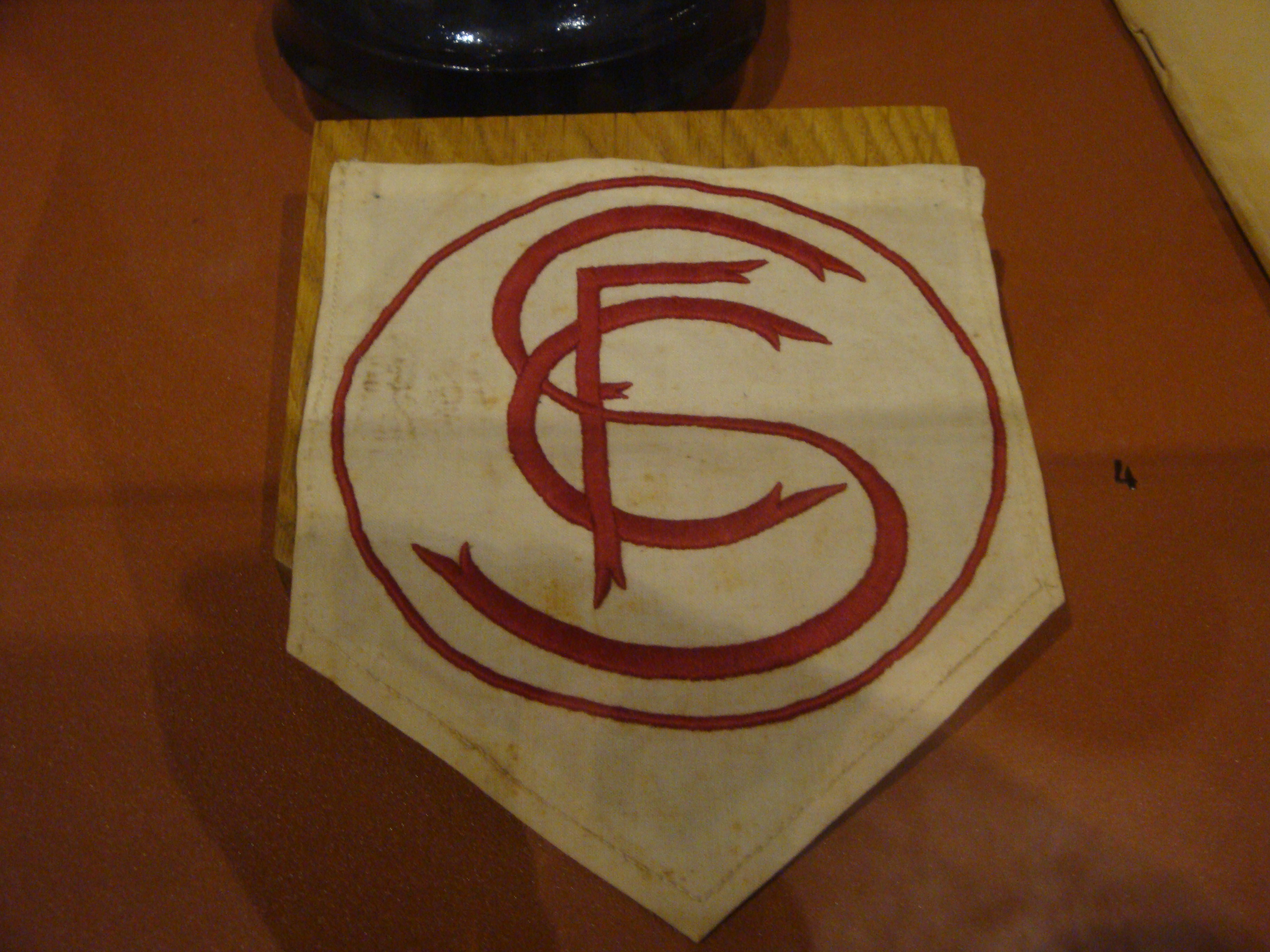 Primer escudo del Sevilla bordado en la camiseta de un jugador